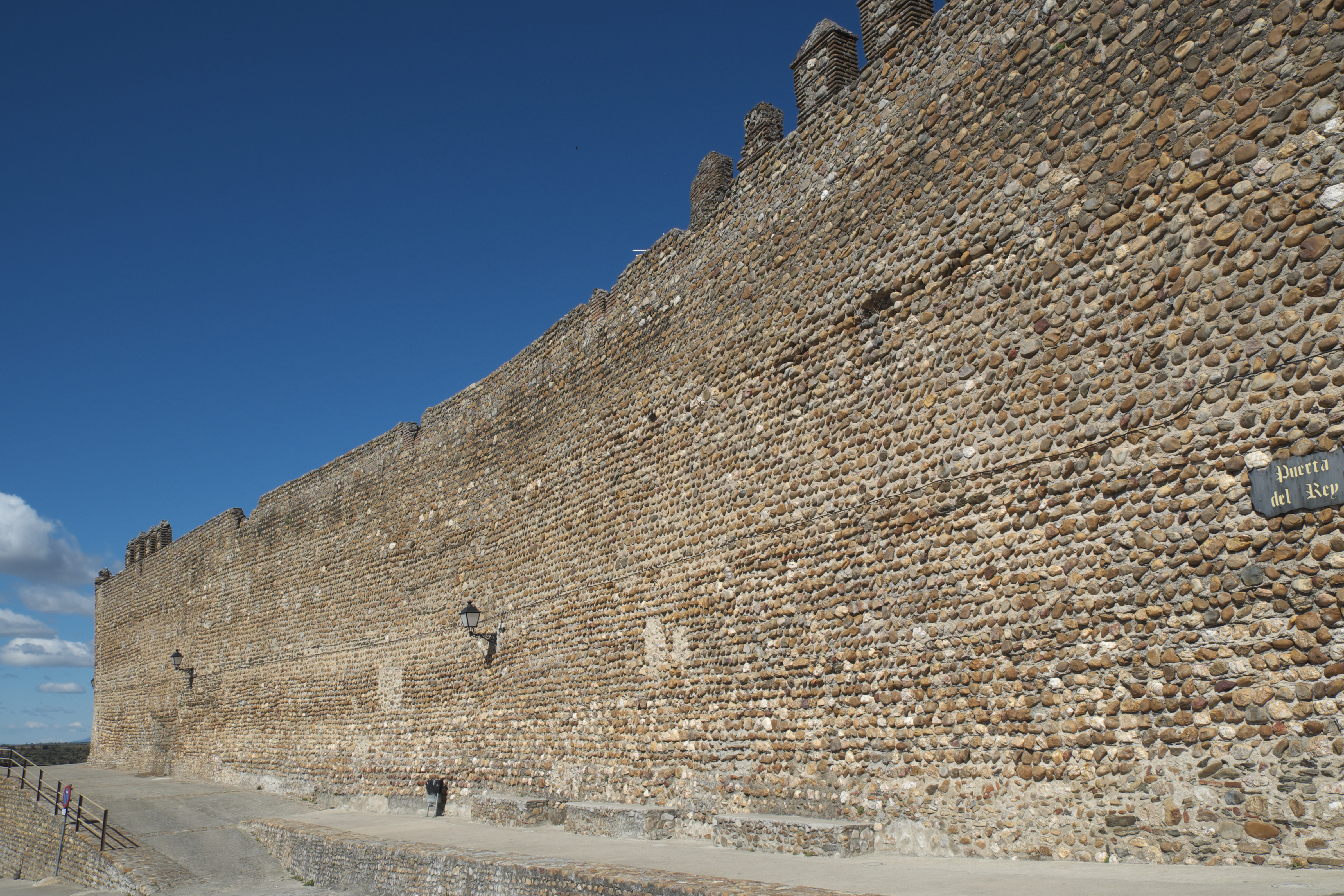 Stadtmauer in Galisteo in der Provinz Cáceres (Extremadura/Spanien)